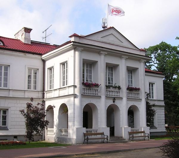 Pałacyk Radziwiłłów w Zegrzu Północnym